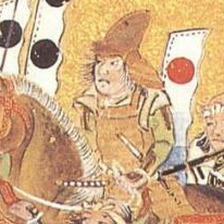 Japanese feudal general Sakuma Morimasa(佐久間盛政)